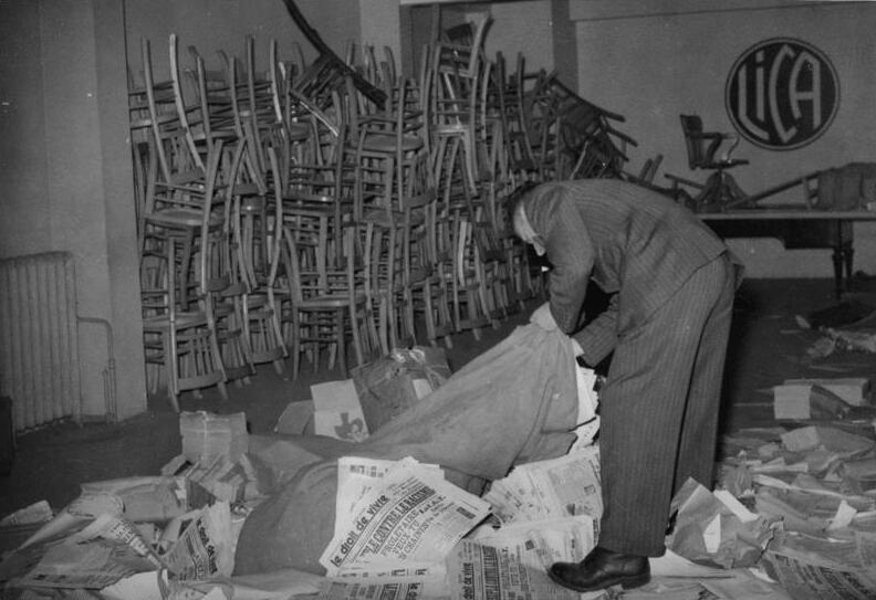 Besetzung eines Büros der LICA durch die RNP, Reinigung Pour le Rapprochement Franco-Allemand Le R.N.P. (Rassemblement National Populaire), occupe les locaux des entreprises Juives, et dont il fera des Permanences. Le nettoyage des locaux de la L.I.C.A. (Ligue Internationale contre l'Antisémitisme). Autor:The New-York Times / Scherl 4318-41 [Besetzung eines Büros der LICA (Internationale Liga gegen den Antisemitismus) durch die RNP (nationale Volkssammlung), Reinigung, u.a. Einsammeln von Zeitungen "le droit de vivre" Zensurdatum: 17.April 1941]